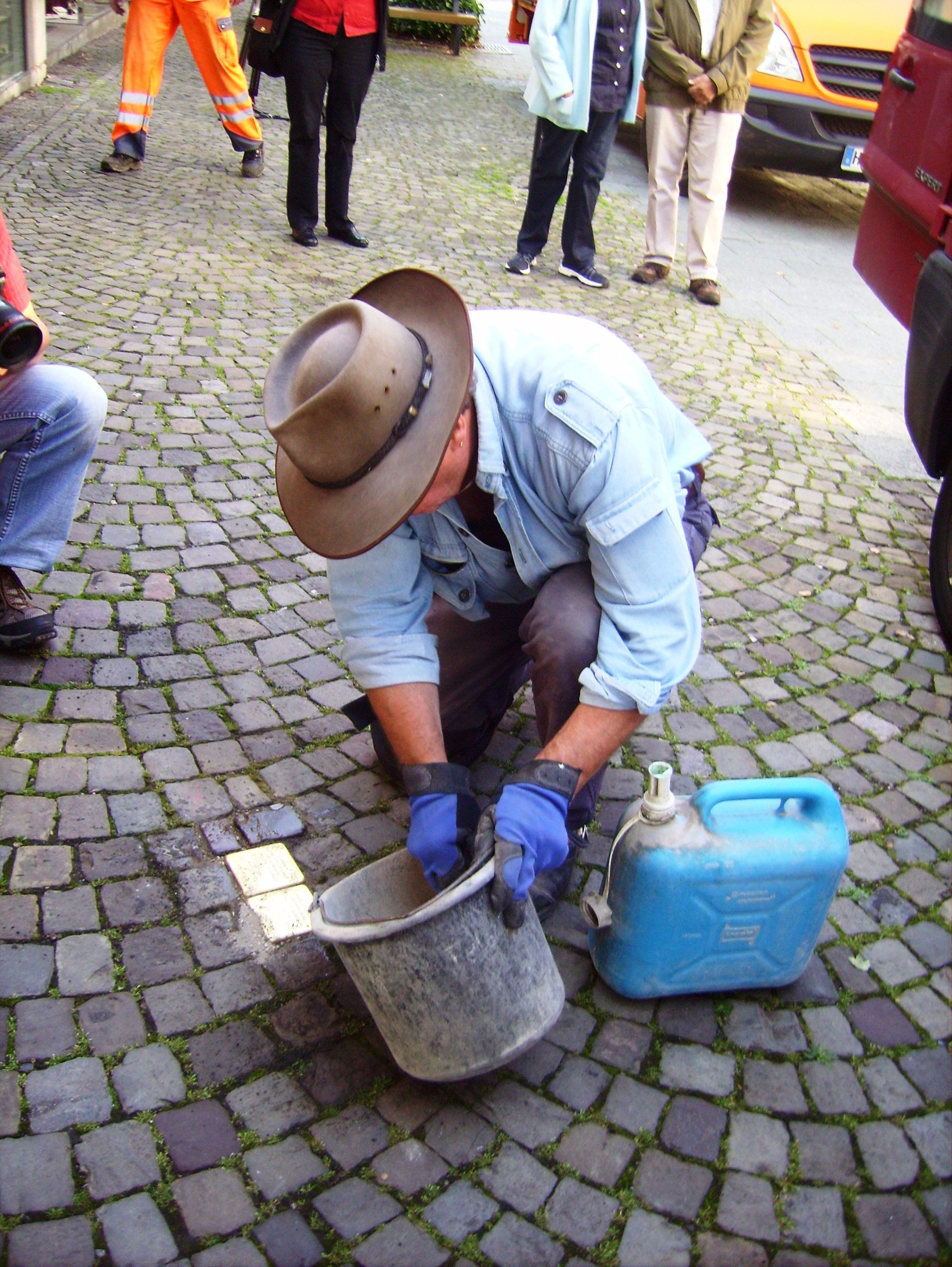 Verlegung der Stolpersteine der Familie Goldberg auf dem Steinweg in Arnsberg durch Gunter Demnig am 14. August 2010